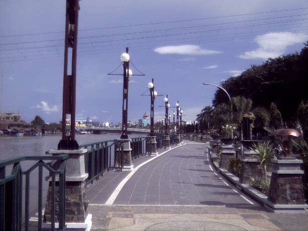 Banjarmasin waterfront, South Kalimantan province, Indonesia